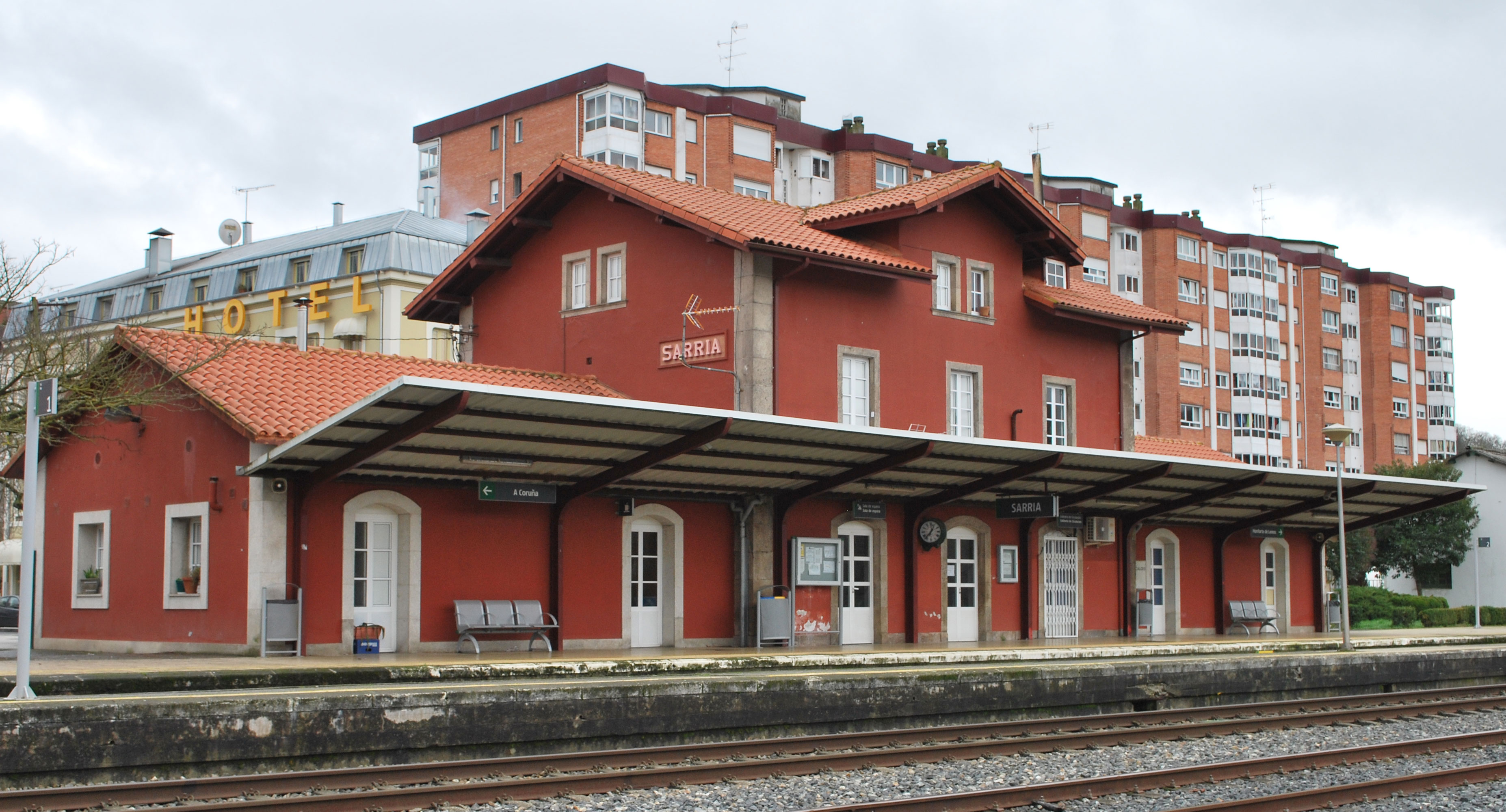 Estación de Sarria (provincia de Lugo).